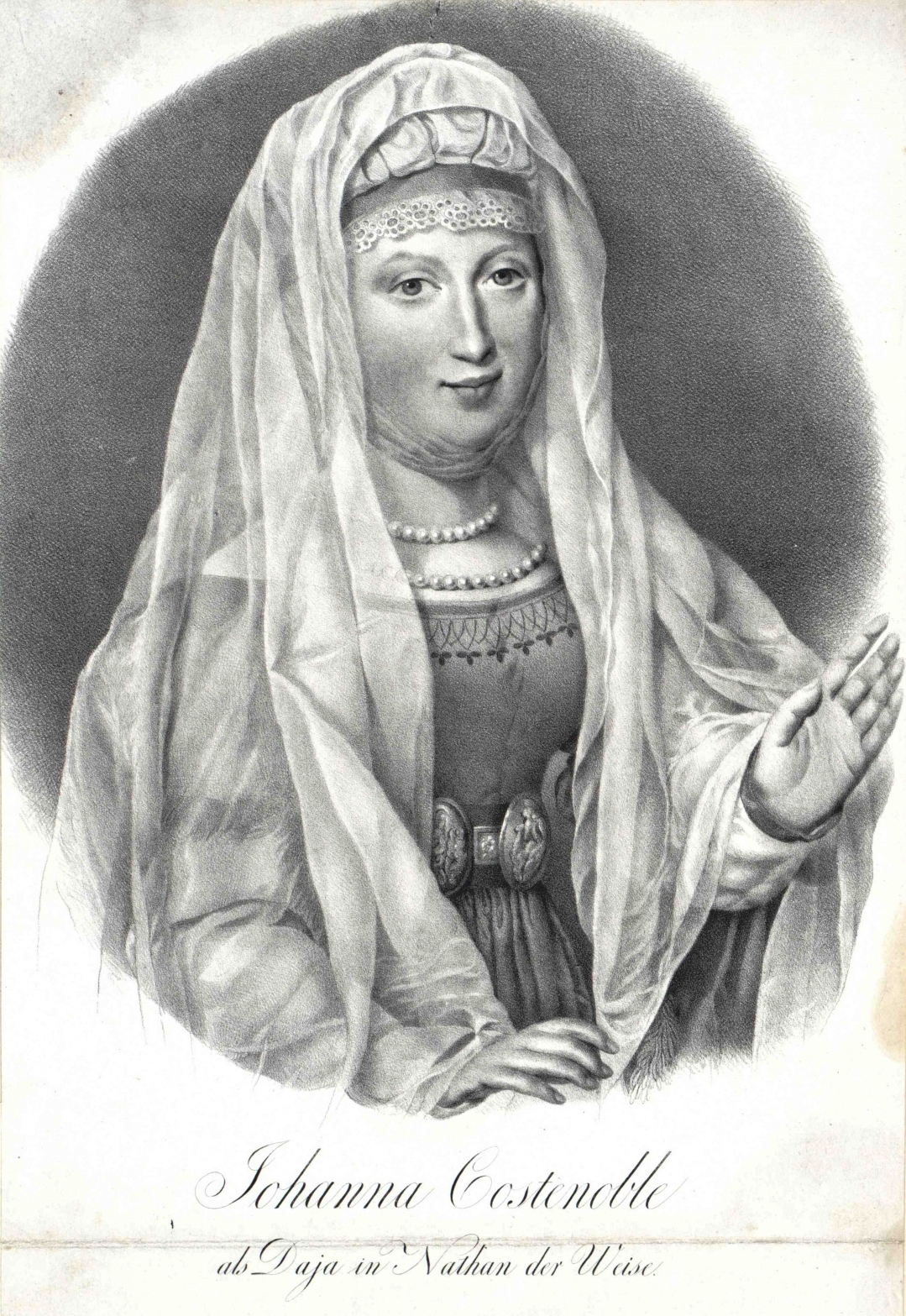 Johanna Costenoble (1777–1822)